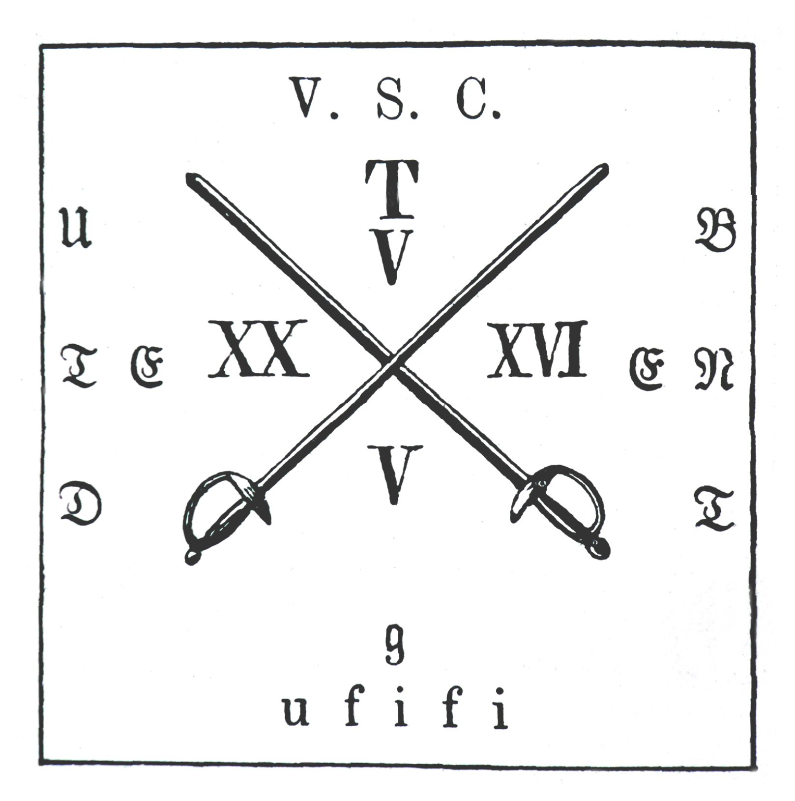 Bundeszeichen der Teutonia I zu Breslau